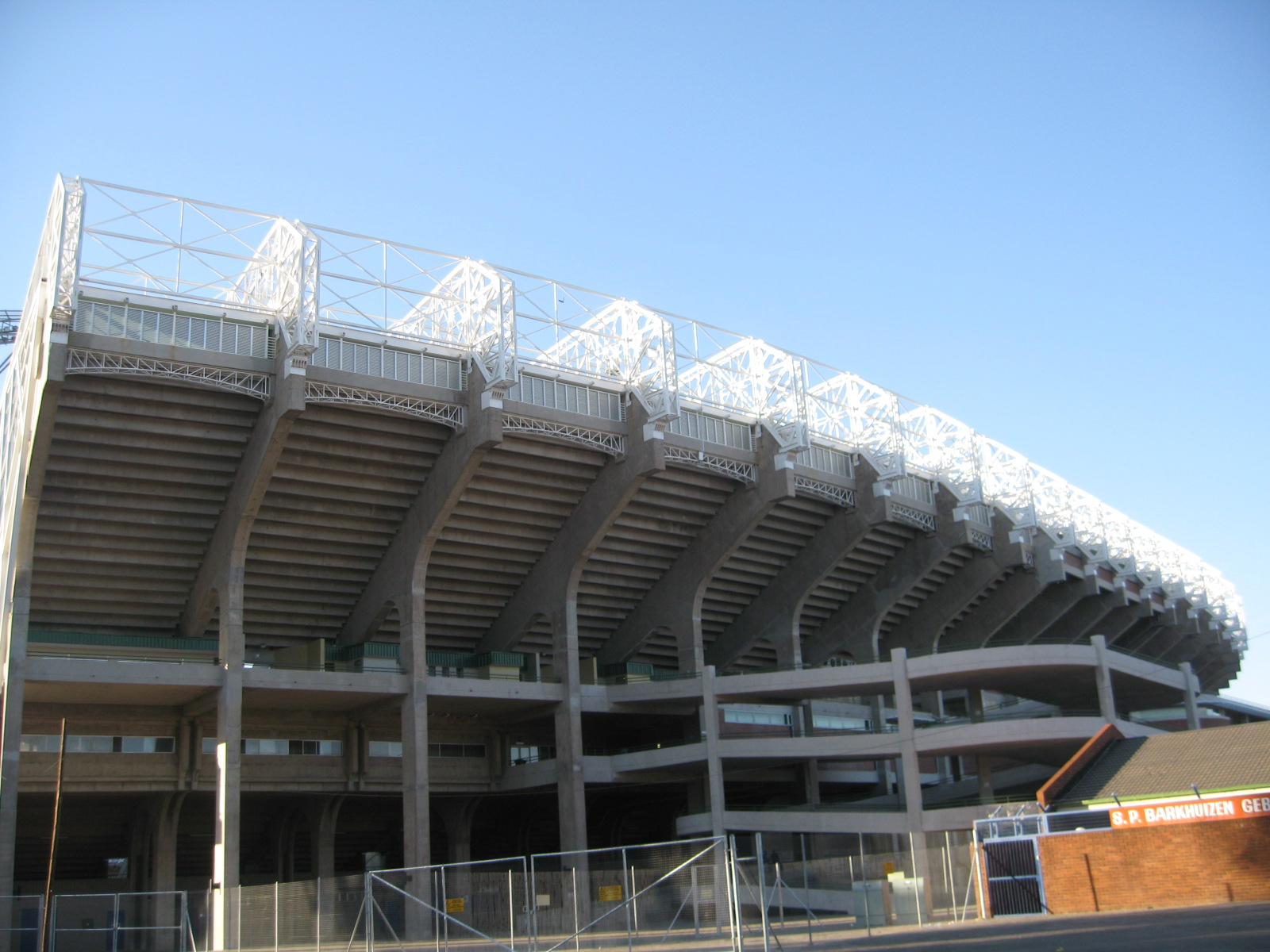 Now 2010 Fifa Stadium